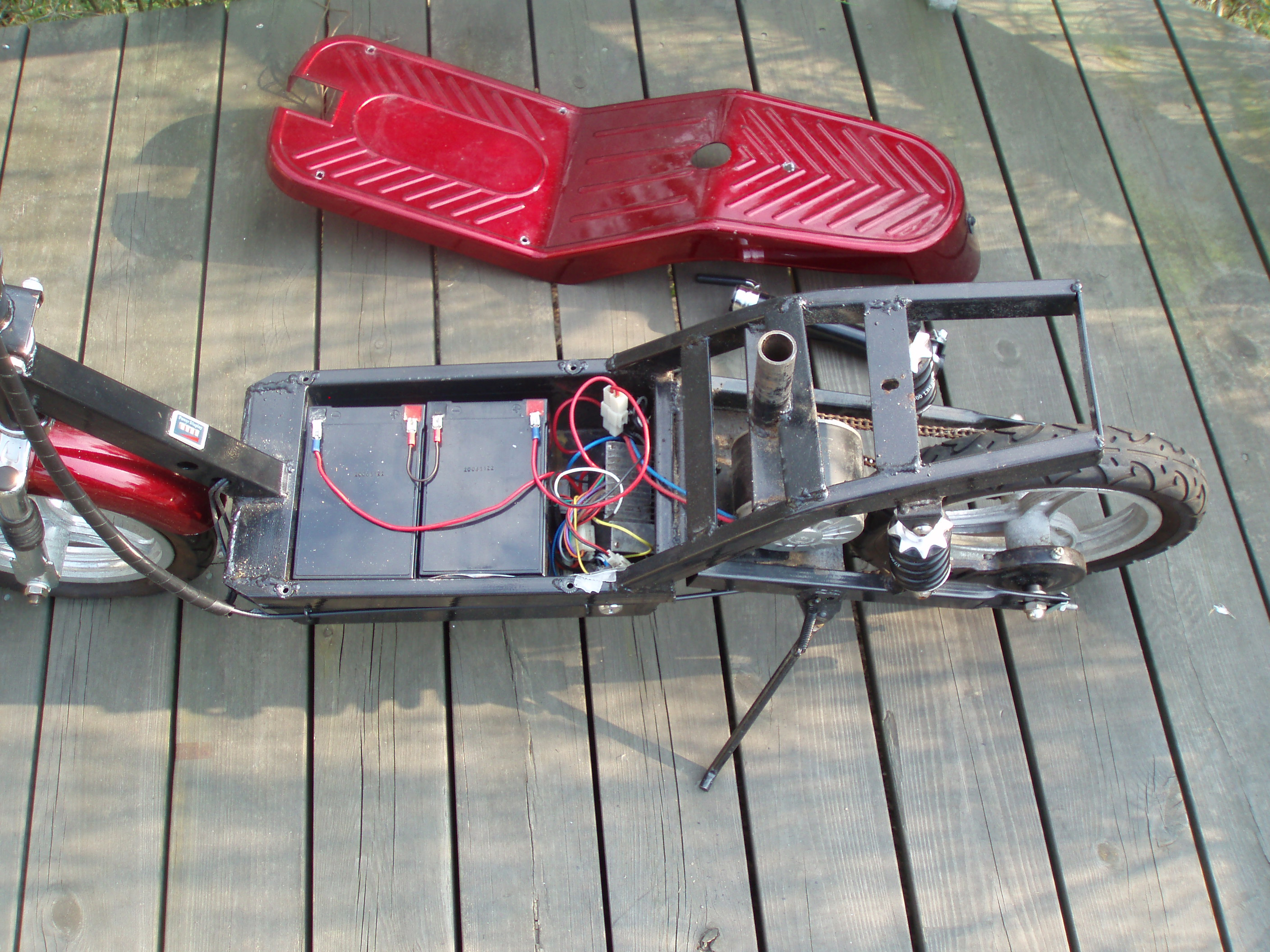 Escooter in Denmark (Model: Urban, made in Spain)